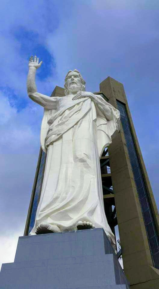 Monumento En l Santísimo parque Chicamocha en Santander bellos.lugar para visitar se puede llegar por teleférico desde Floridablanca. Esta fotografía fue tomada en un área protegida de Colombia con el código 480 del RUNAP.